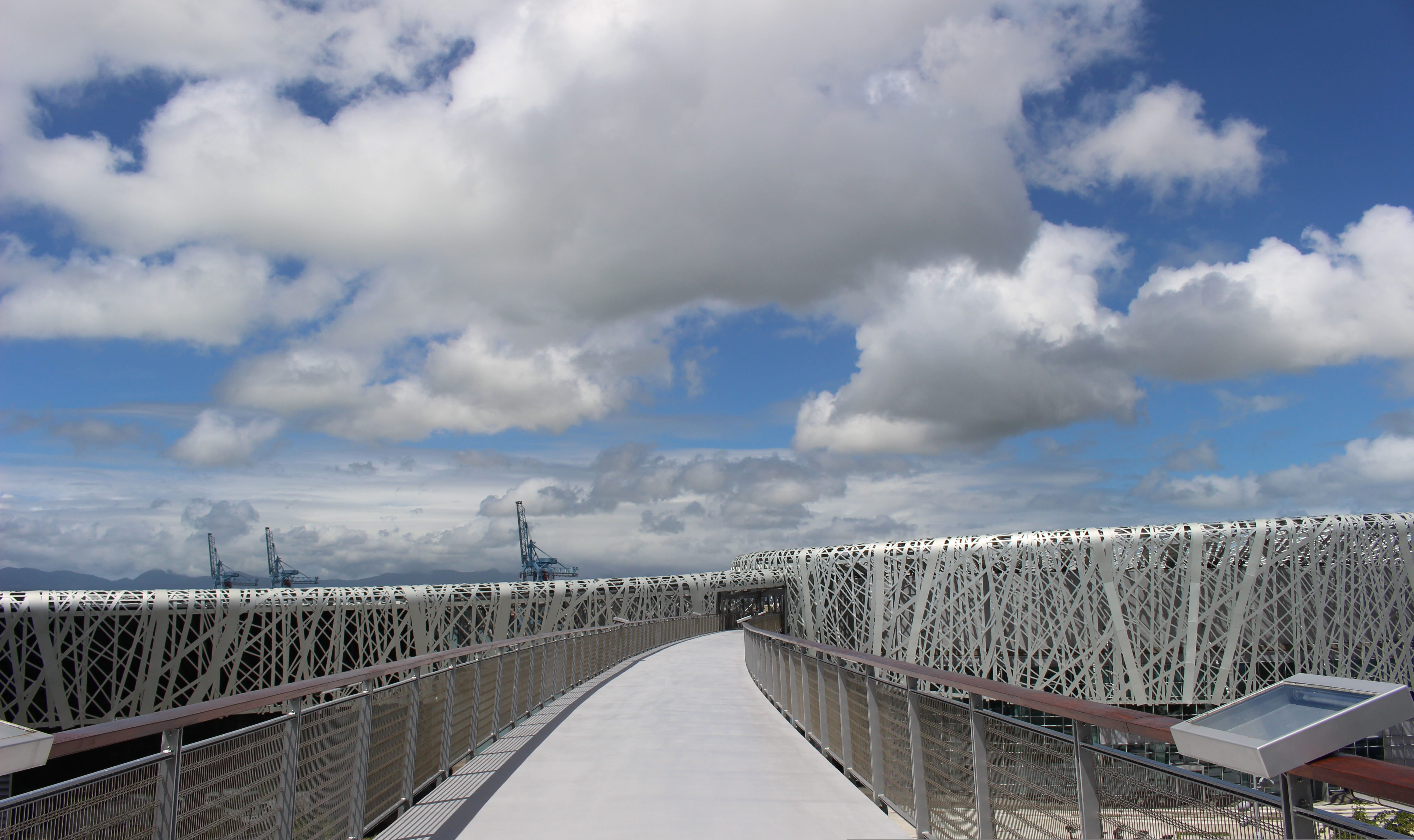 Vue sur la structure métallique et la passerelle du Memorial acte